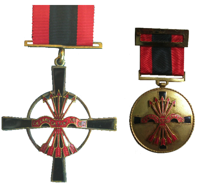 Cruz y medalla de la Orden Imperial del Yugo y las Flechas